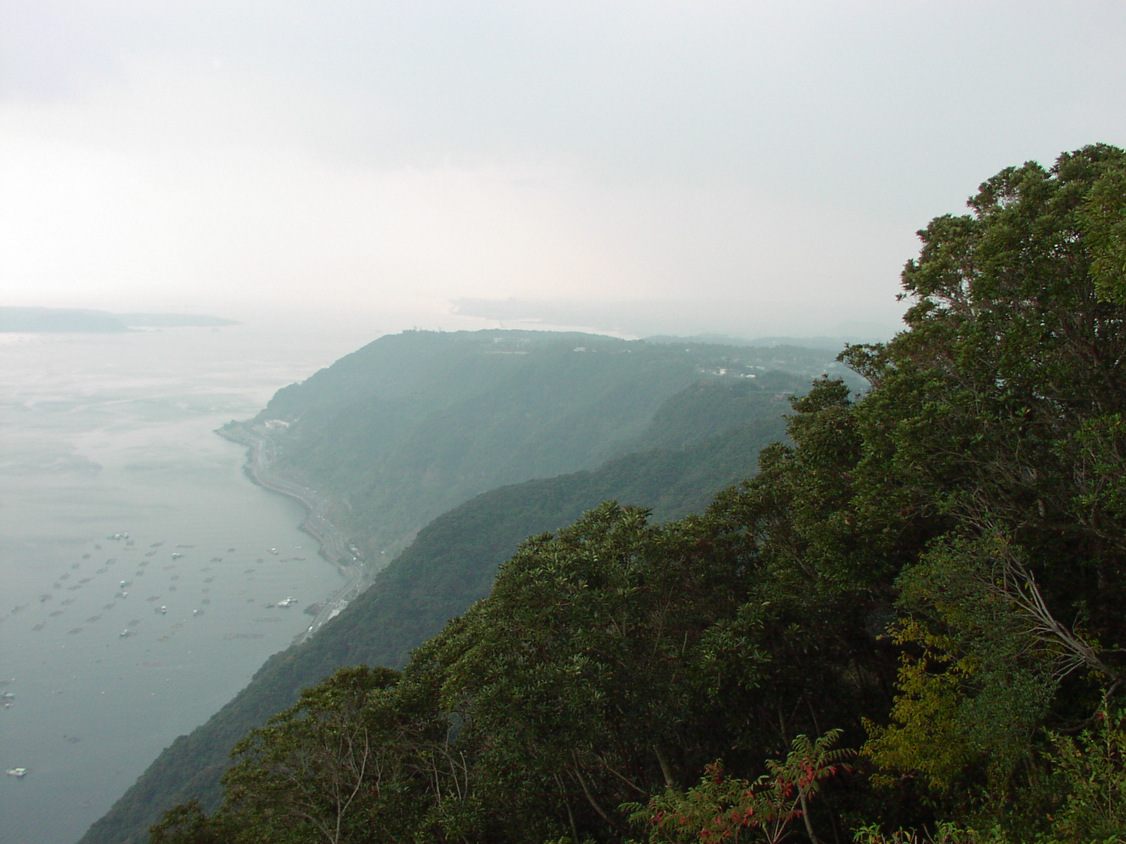 寺山公園-terayama